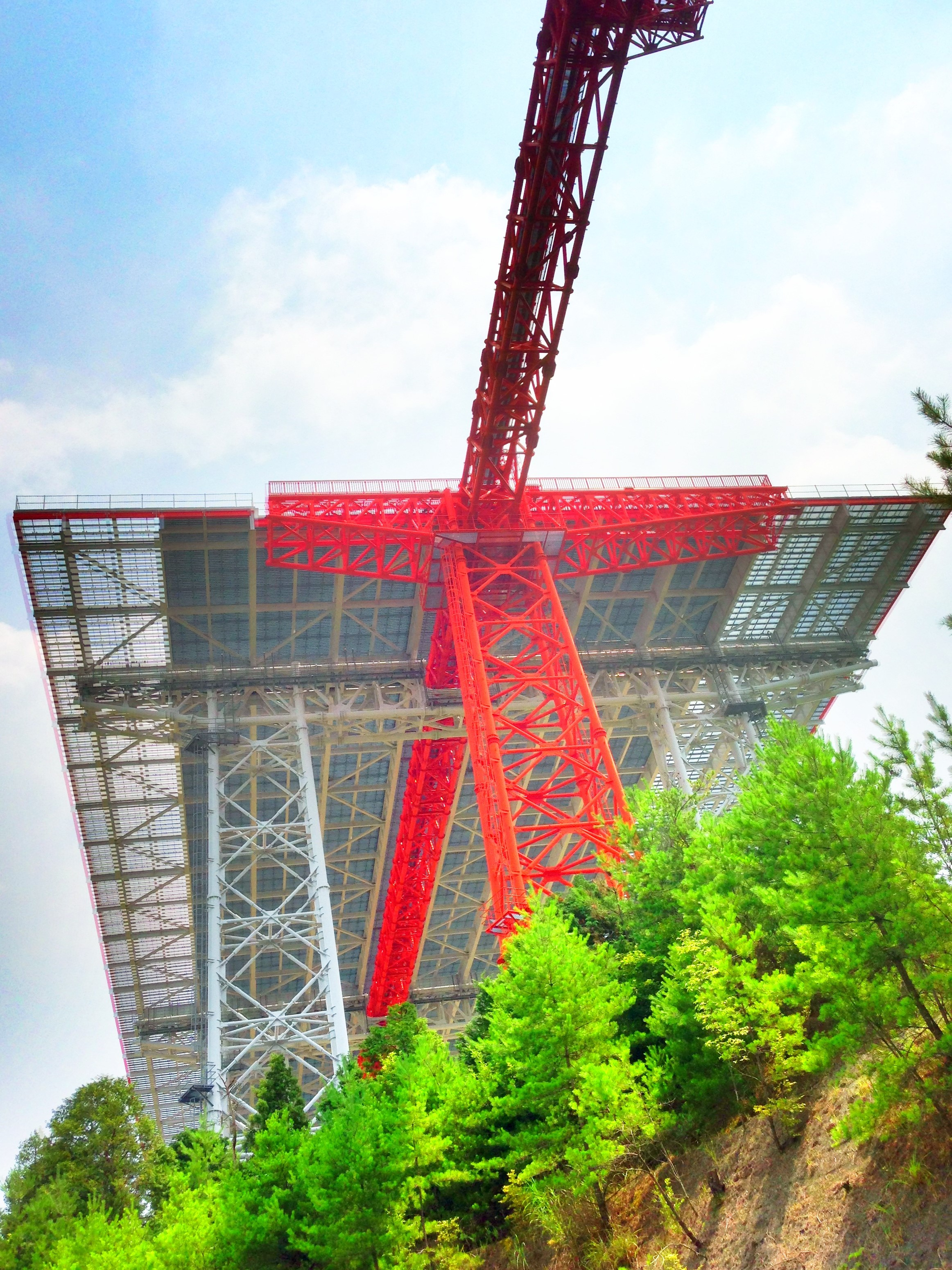 広島空港の滑走路の西端